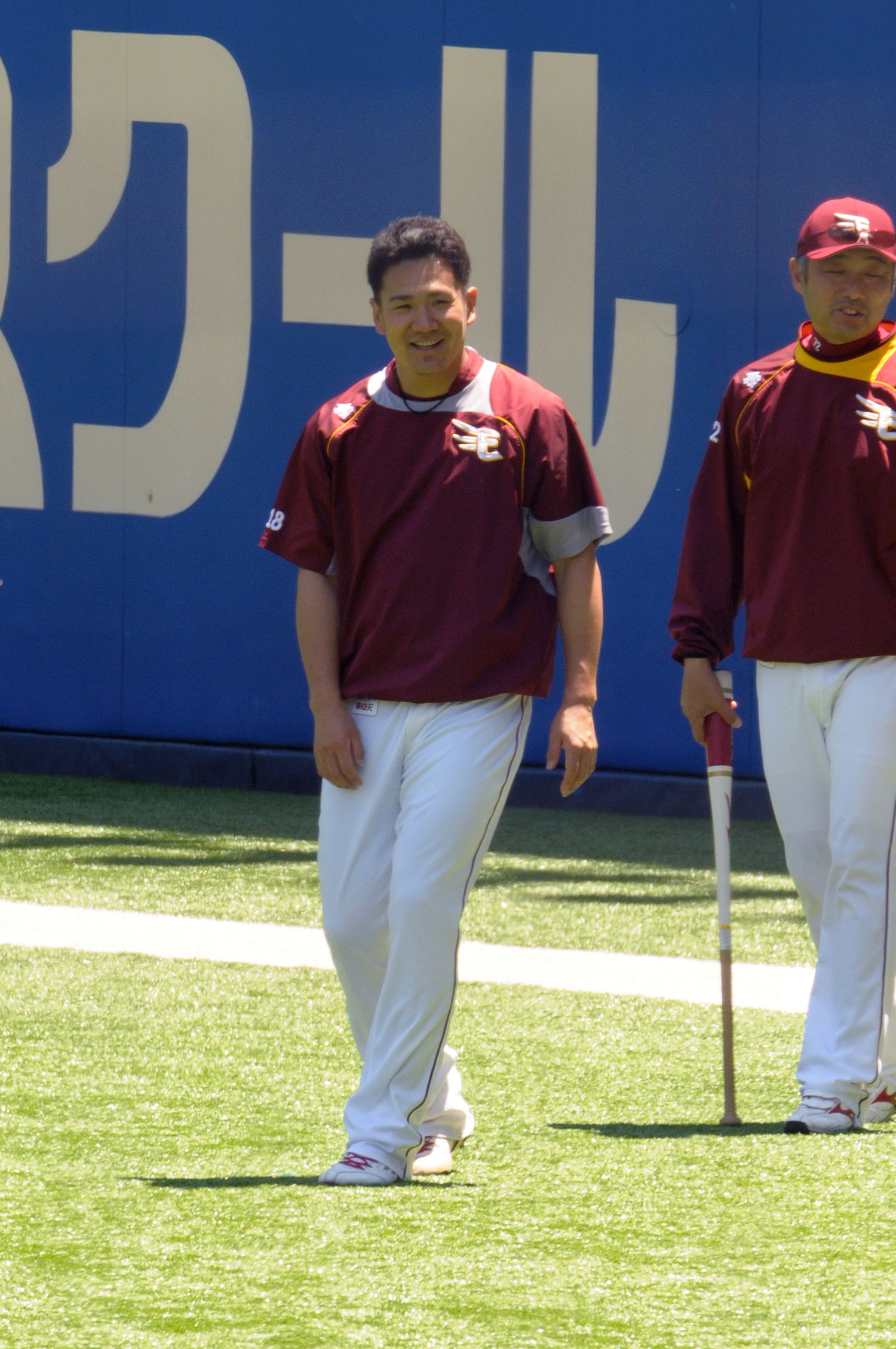 楽天イーグルス、田中将大選手。QVCマリンフィールドで。